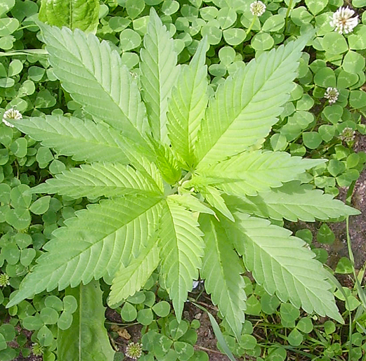 Hemp/Hanf